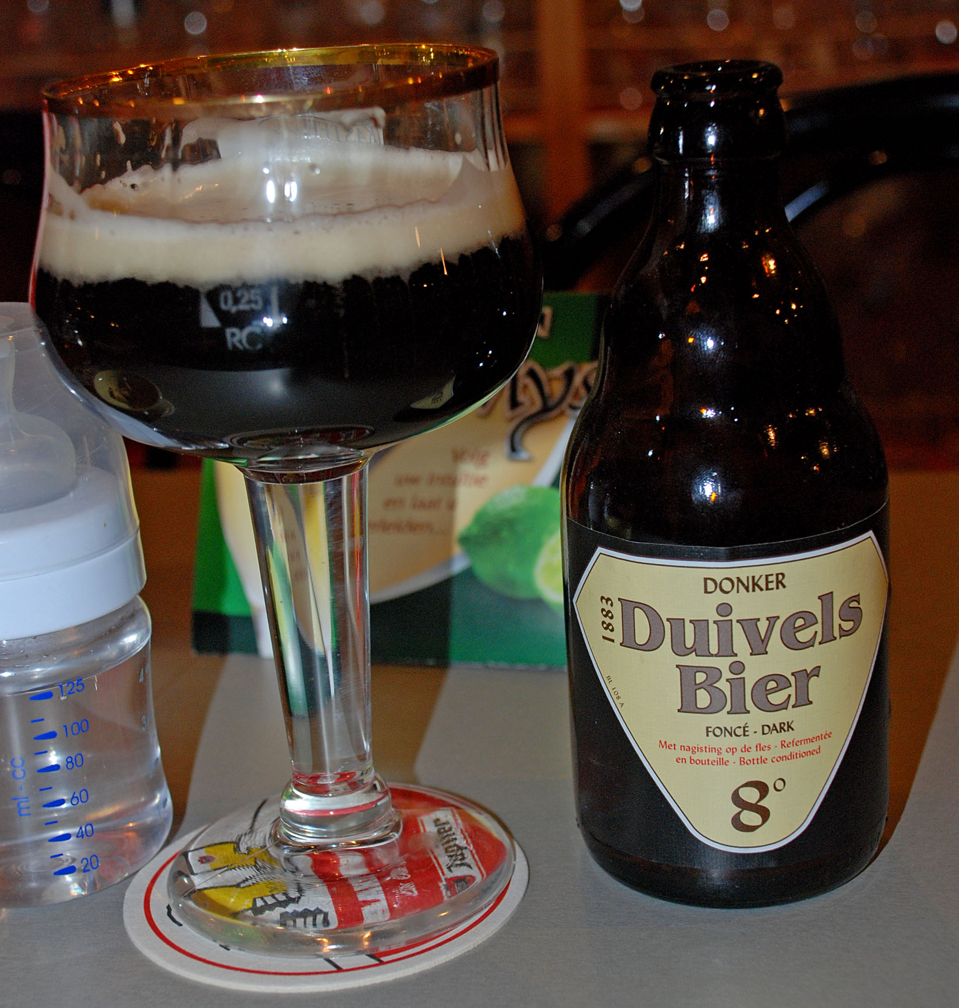 Duivelsbier